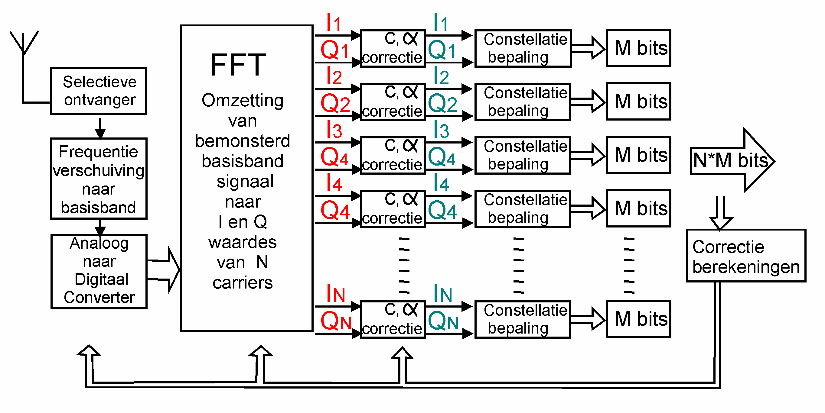 Blokschema van een OFDM ontvanger (Nederlandse tekst)